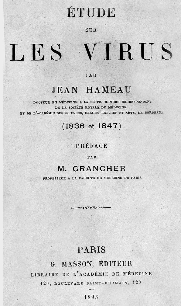 Couverture de la thèse de Jean Hameau relative à l'étude sur les virus